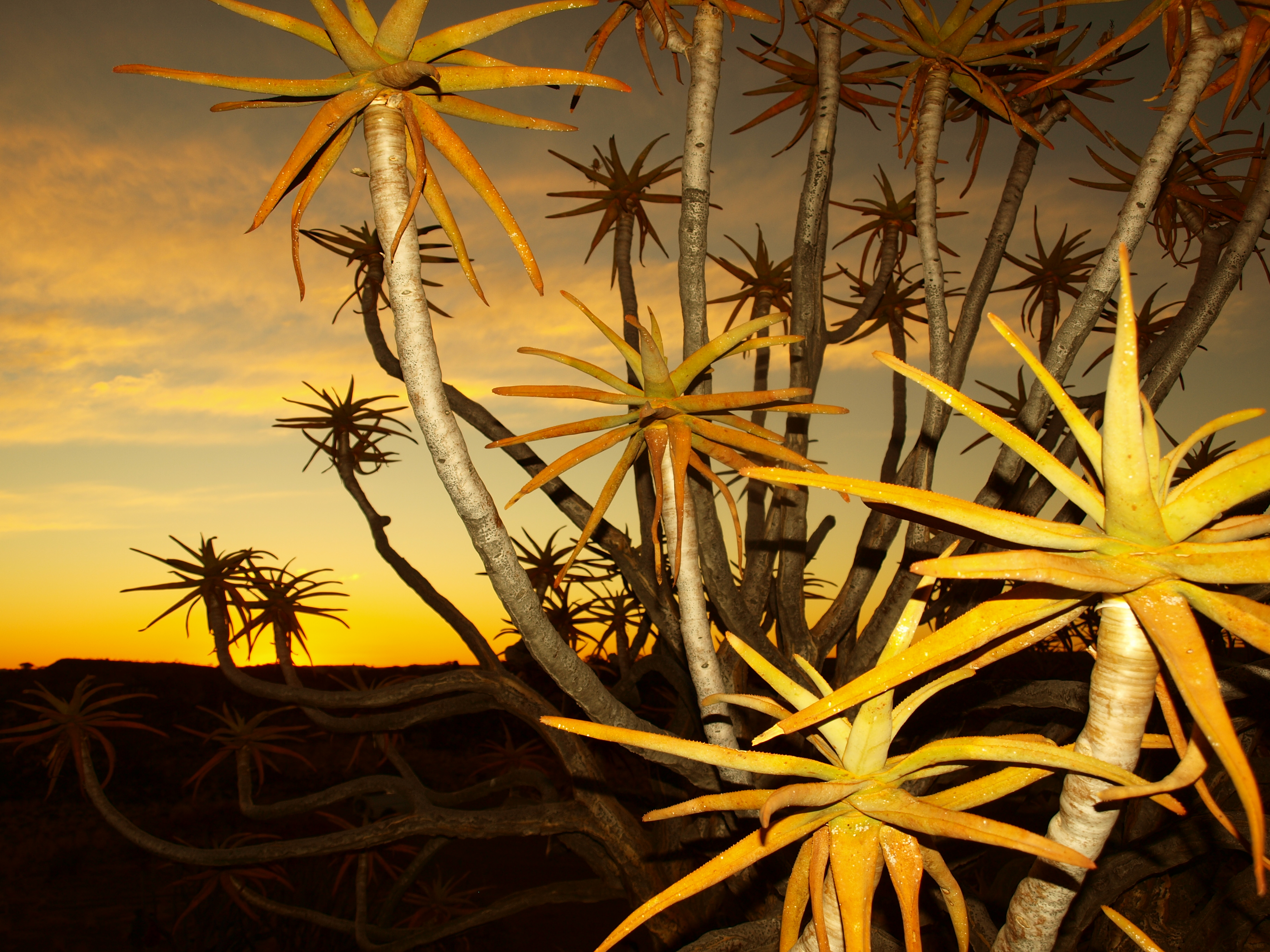 Nahansicht Köcherbaum (Aloe dichotoma)